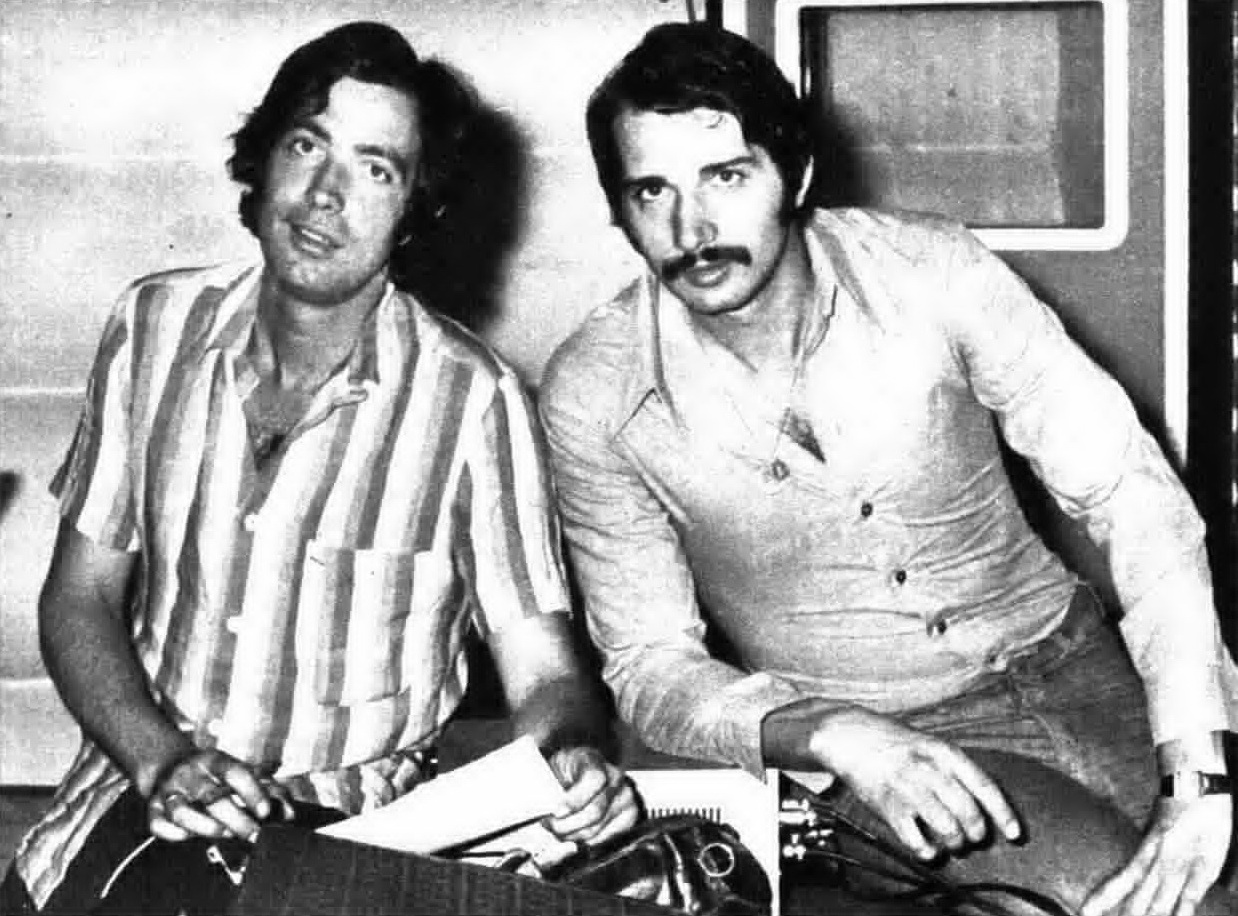 Italian musicians Guido & Maurizio De Angelis